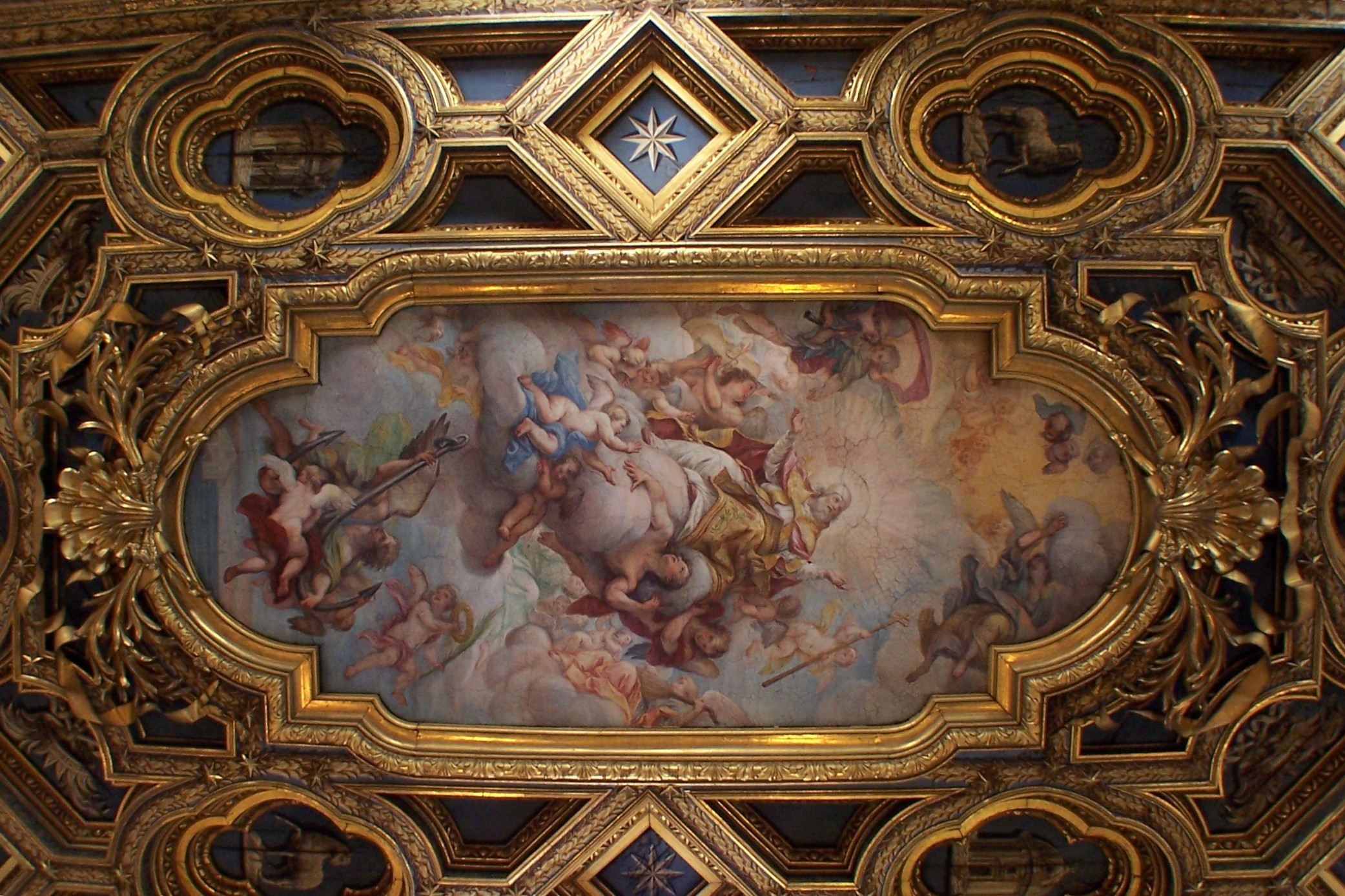 Roma San Clemente